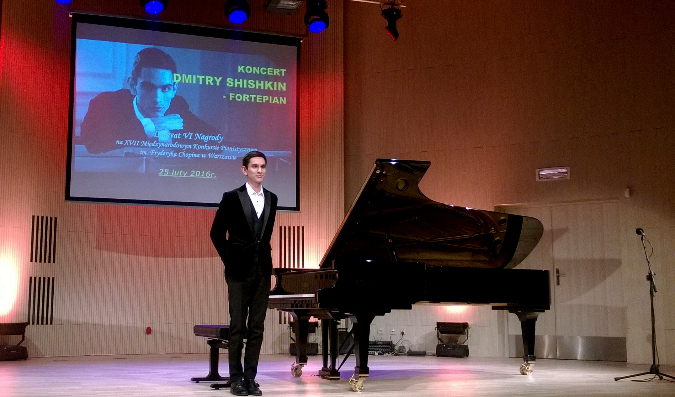 Dmitry Shishkin podczas koncertu w Państwowej Szkole Muzycznej w Żywcu